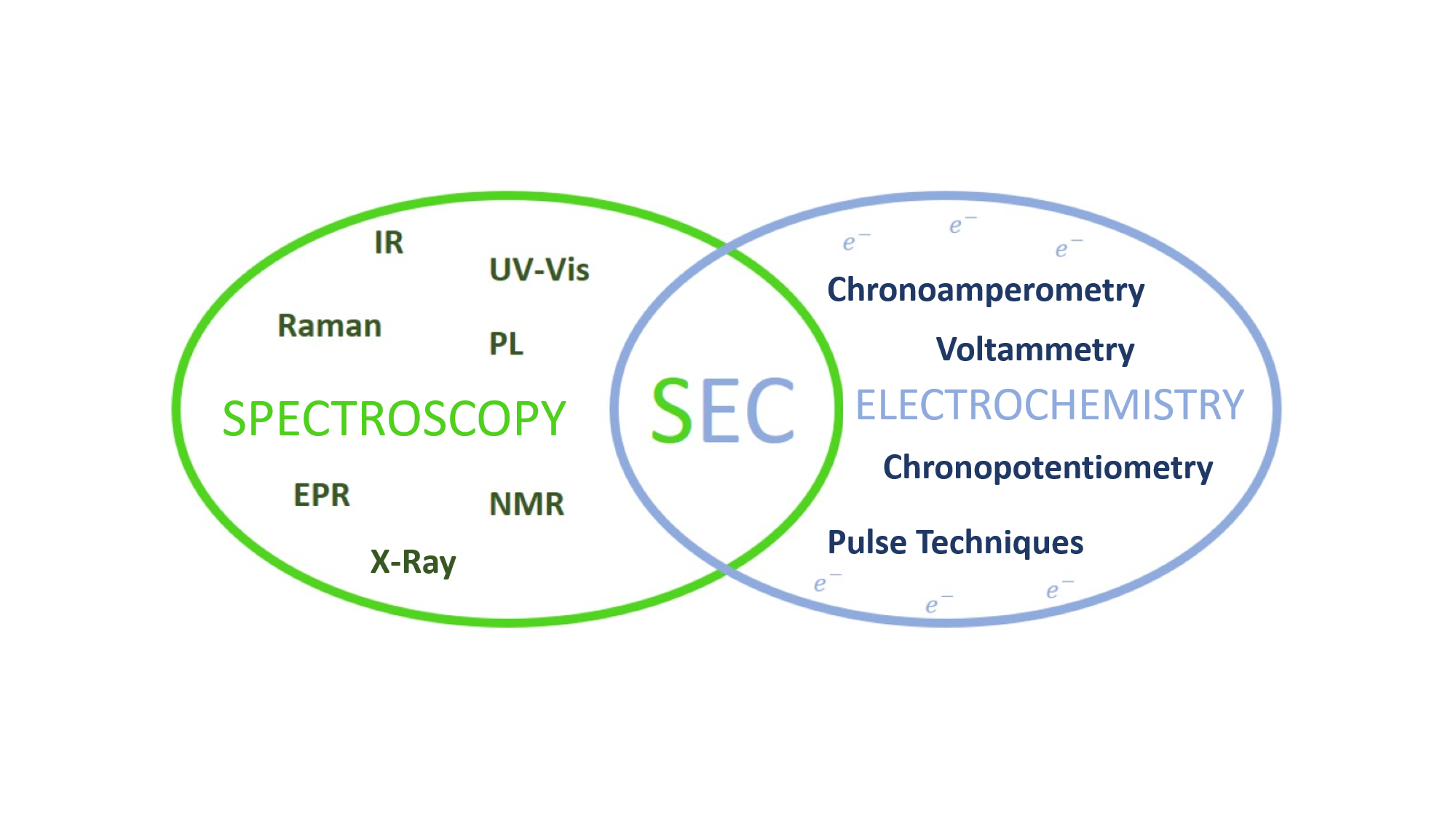 Técnicas espectroscópicas y electroquímicas que en conjunto forman la espectroelectroquímica.